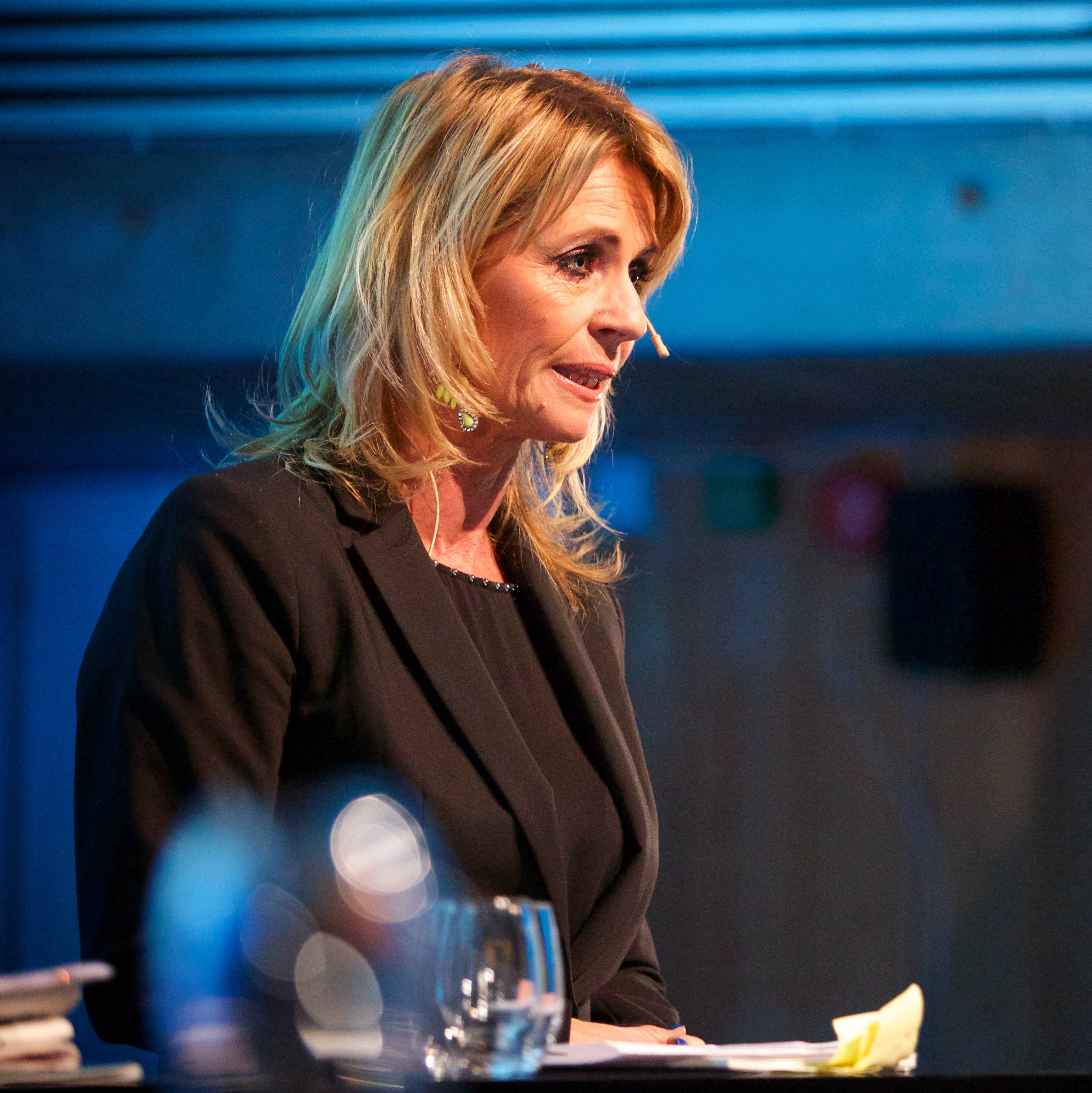 Medvirkende: Ragnhild Mølster (Nordicom), Ellen Arnstad (Aller Media), Gunnar Falck (Västerbottens-Kuriren), Suzanne Moll (International Media Support). Moderator: Kari Birkeland (Meyer ilm)